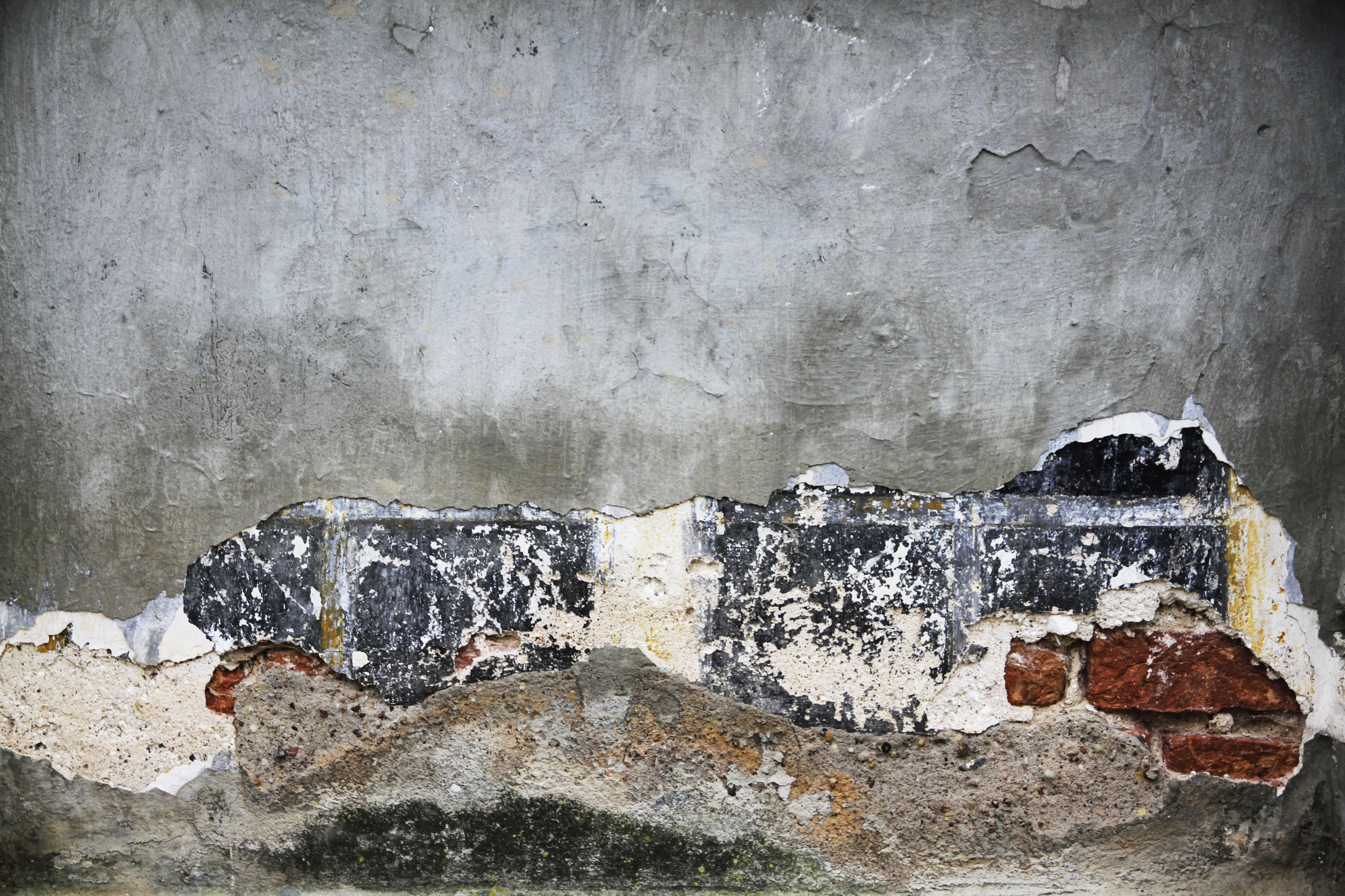 «The Colours of the Fortress II». Fotokunst av den norske kunstneren Beate Gjersvold (2015) 70 x 85 cm